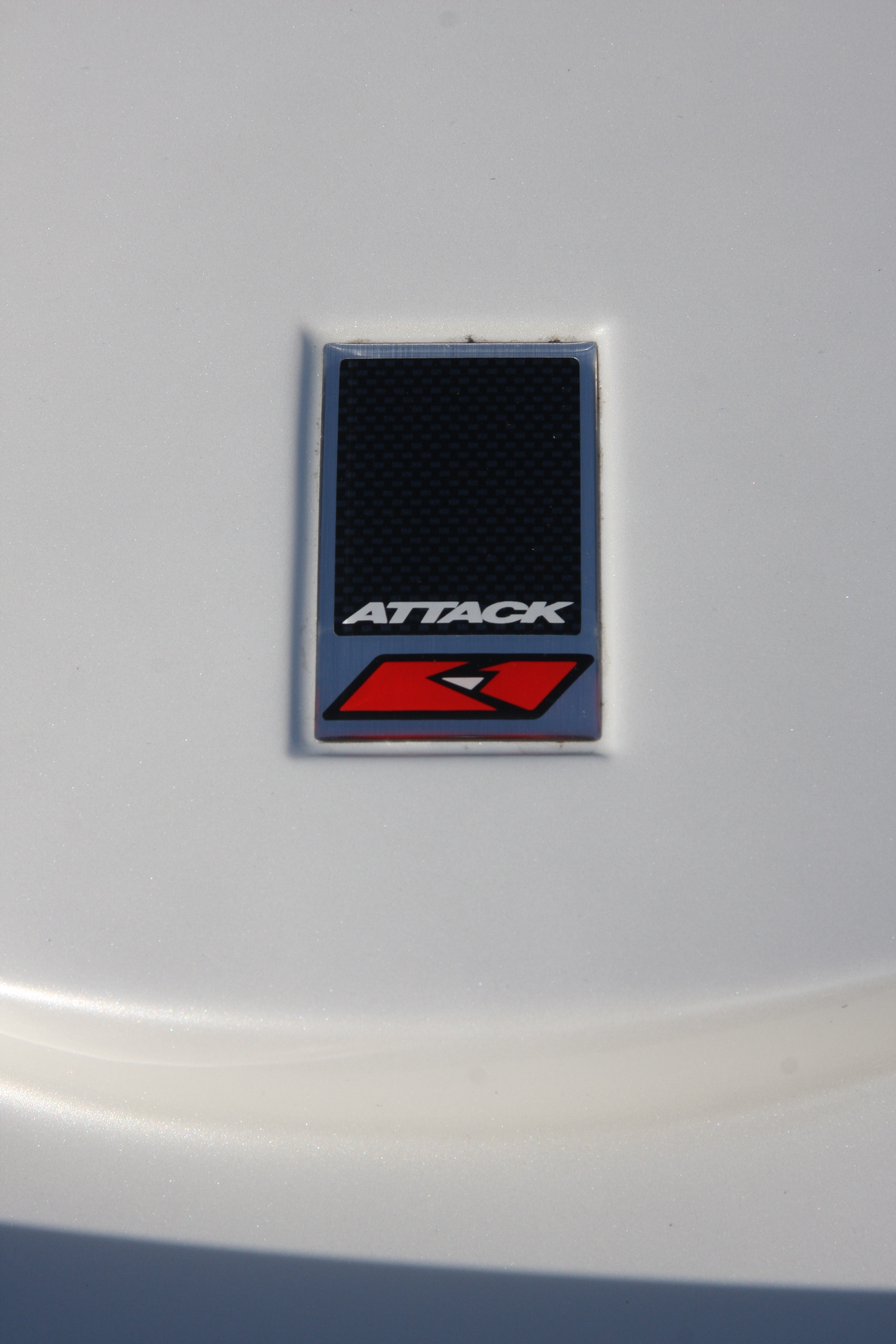 Asanti Attack K1 motif